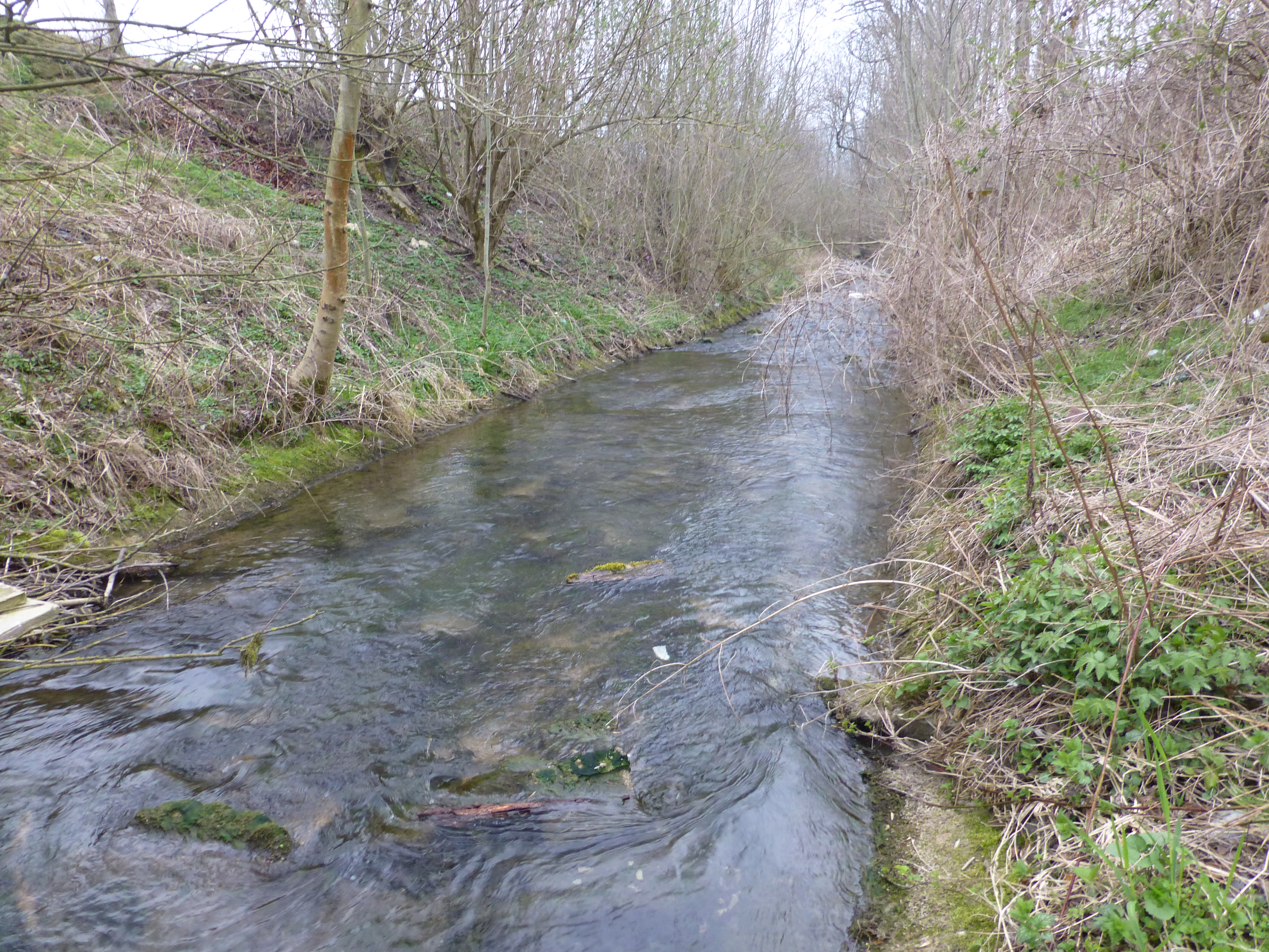 Die Lutter oberhalb von Großbartloff